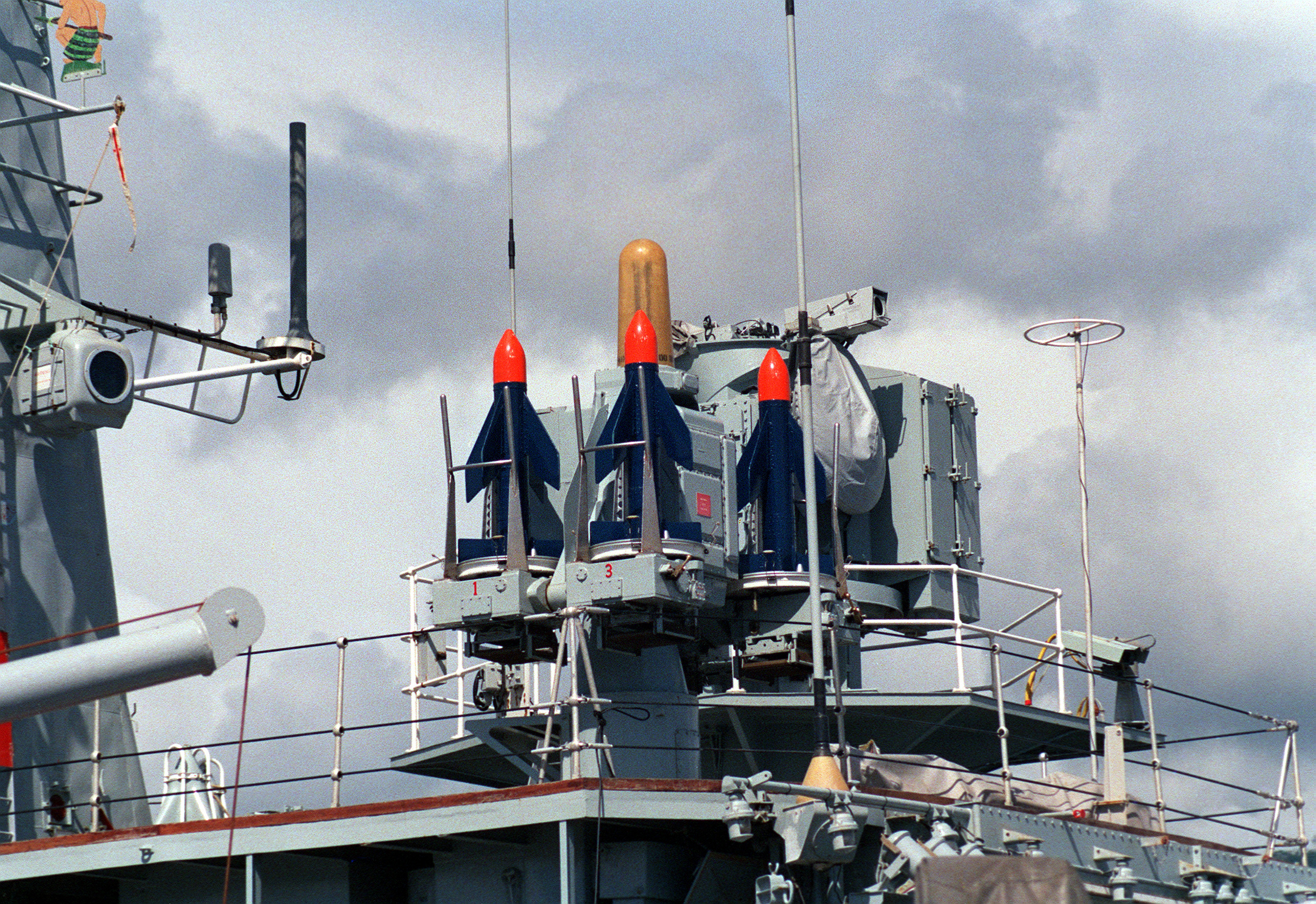 A close-up view of Sea Cat missiles on the New Zealand frigate HMNZS WELLINGTON (F-69).